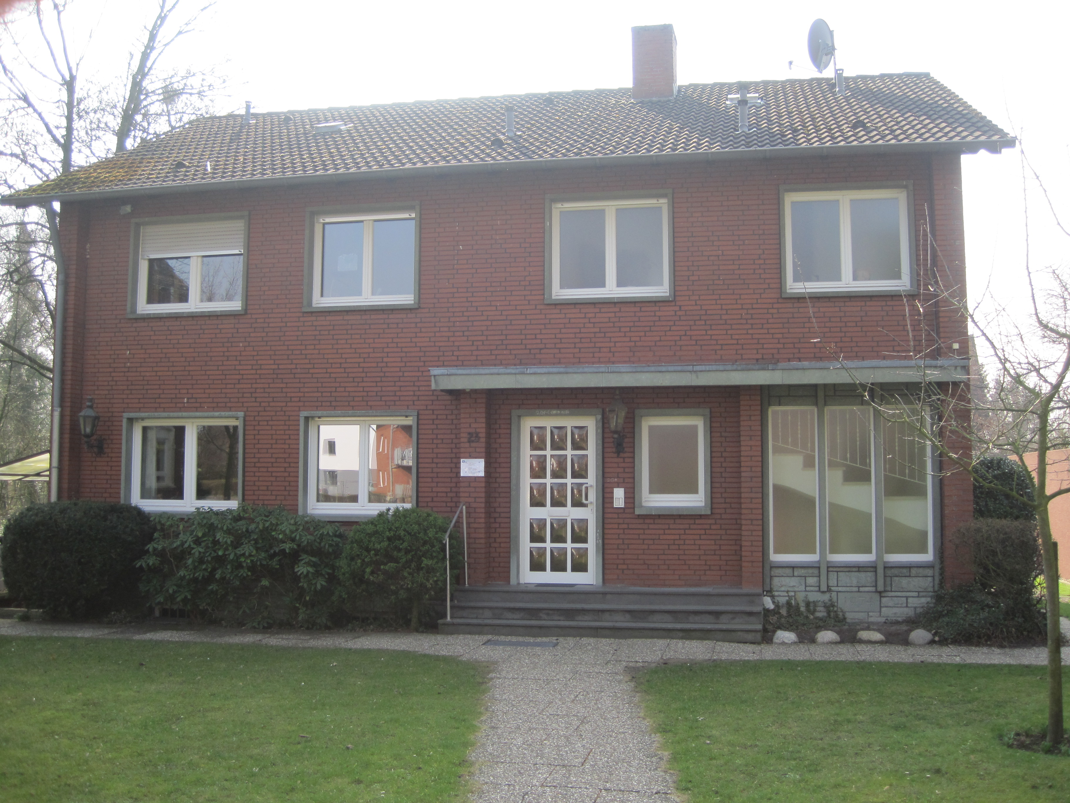 Das Foto zeigt das Pfarrbüro der St. Stephanus-Kirche in Hamm-Bockum-Hövel.